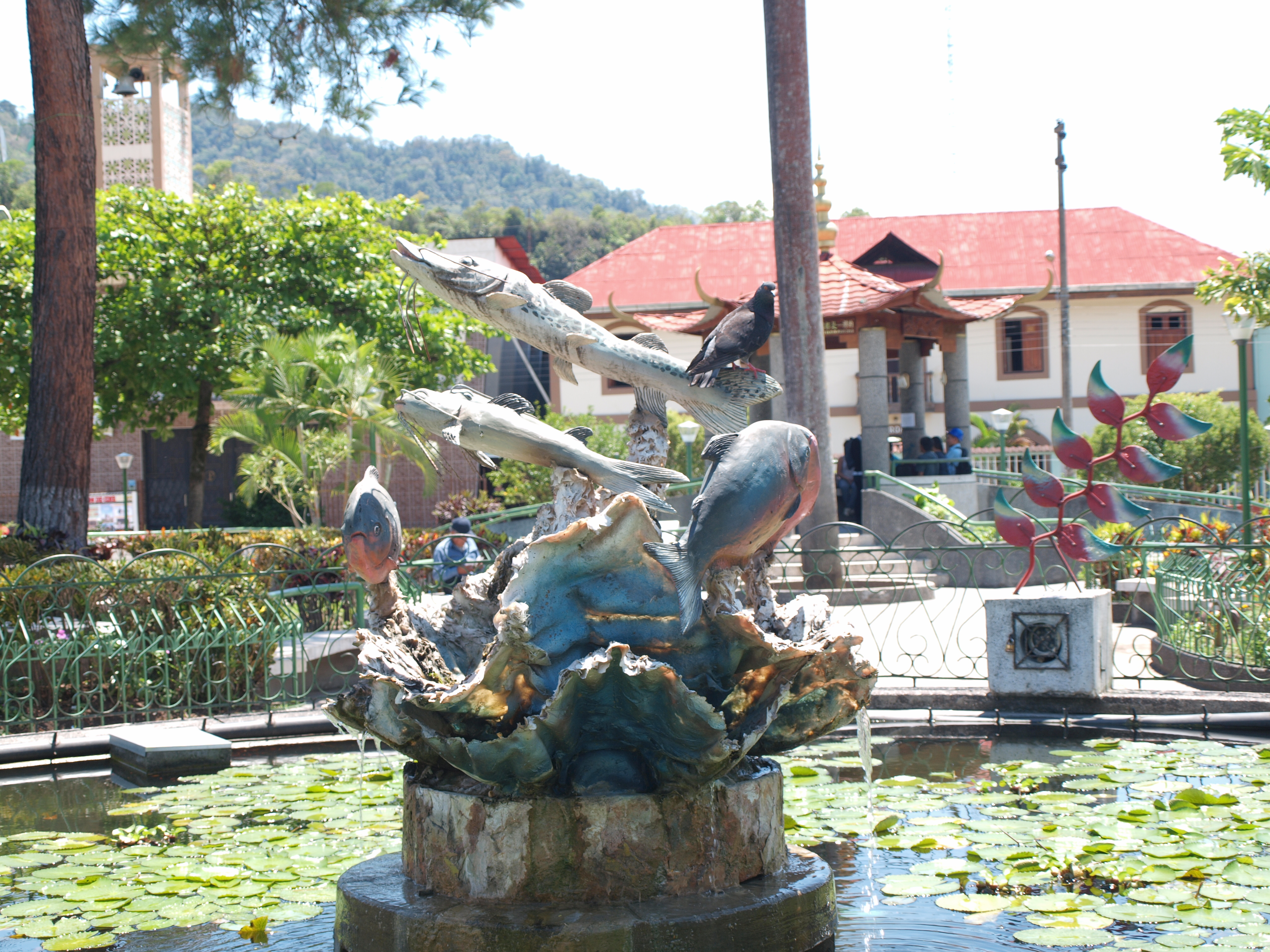 Plaza de Armas de San Ramón